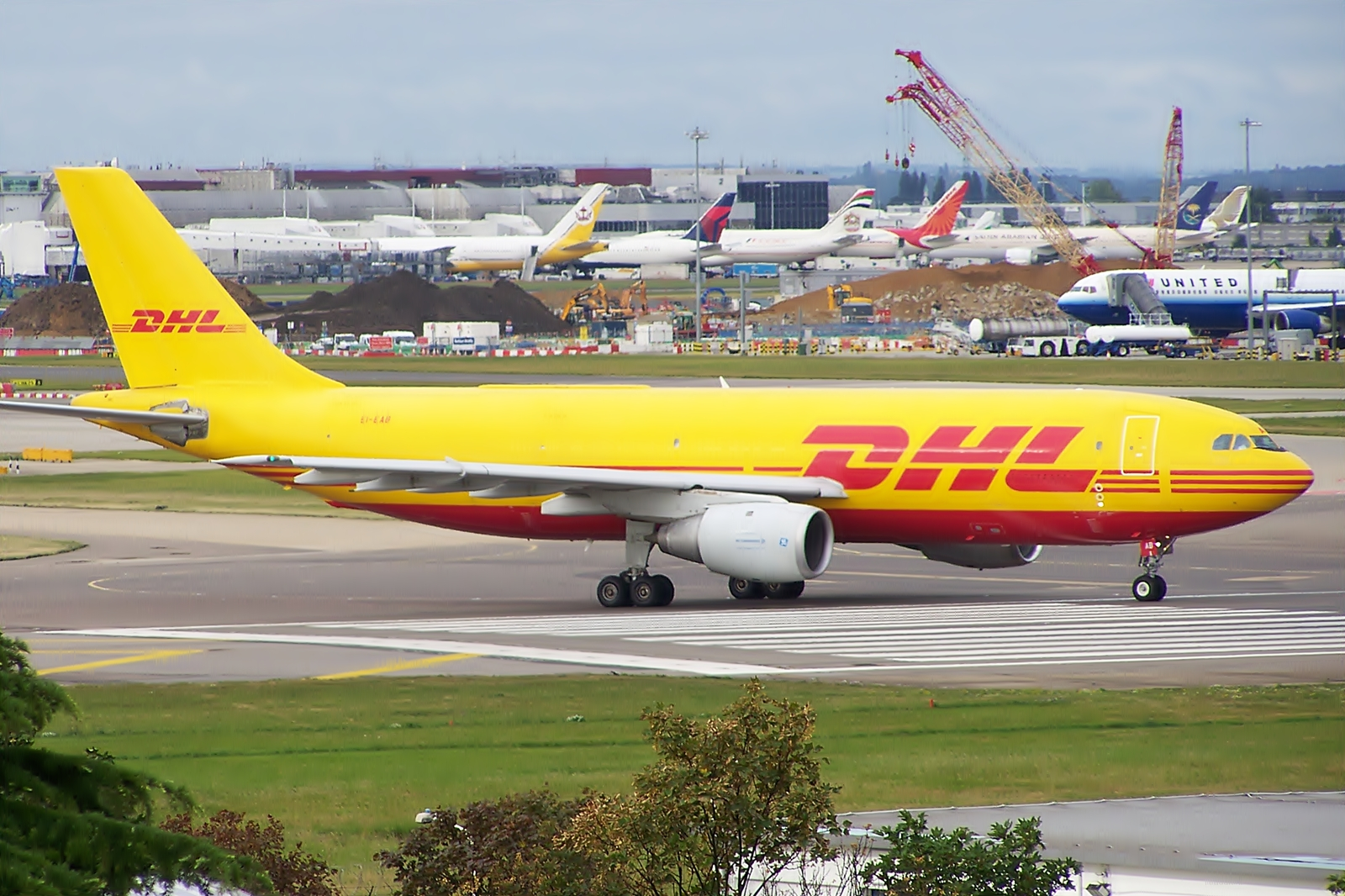 EI-EAB A300 DHL